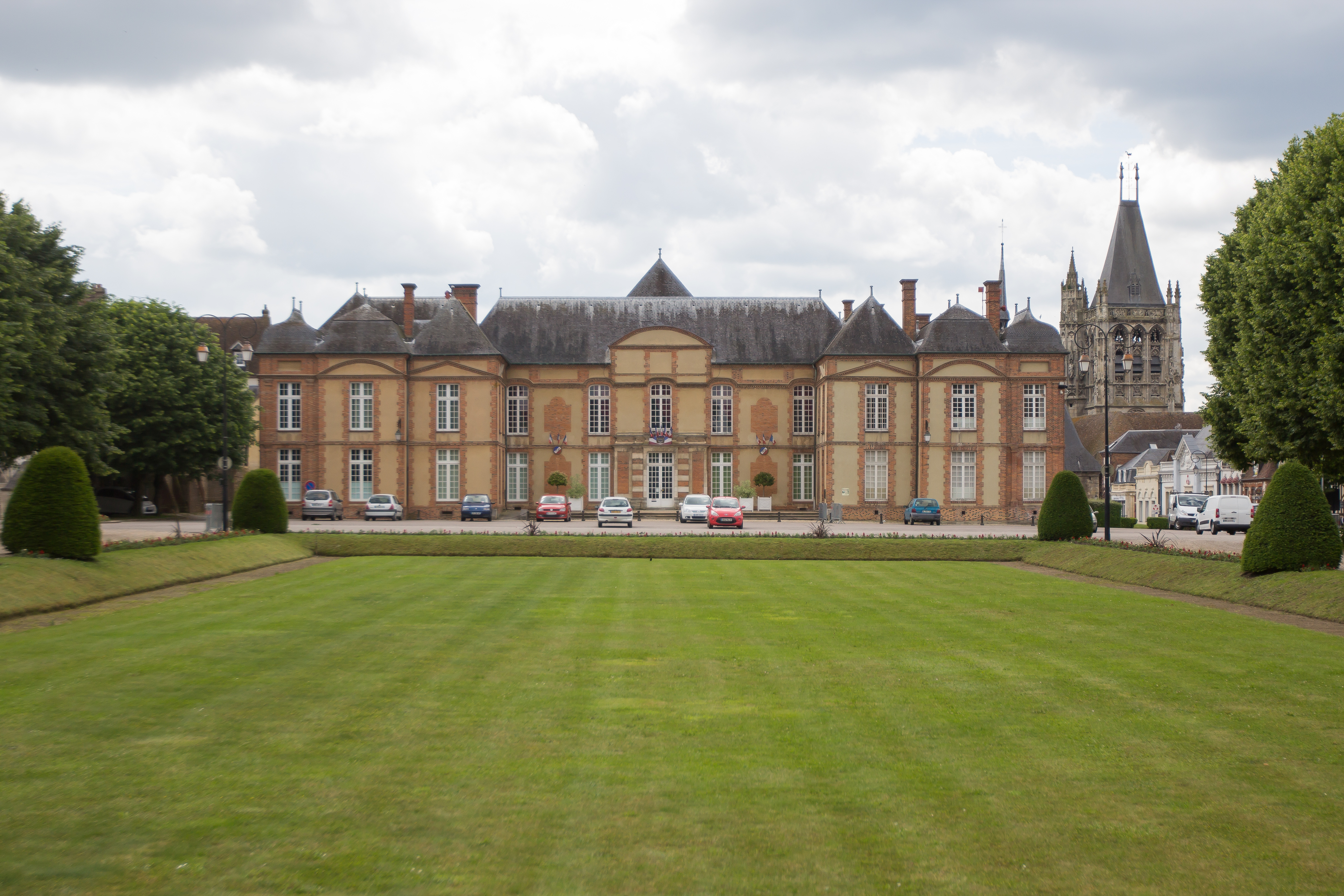 Château de L'Aigle (Eure, Normandie, France)